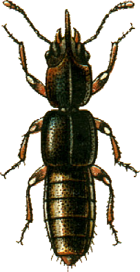 This file has been extracted from another file: Jacobs15.jpg